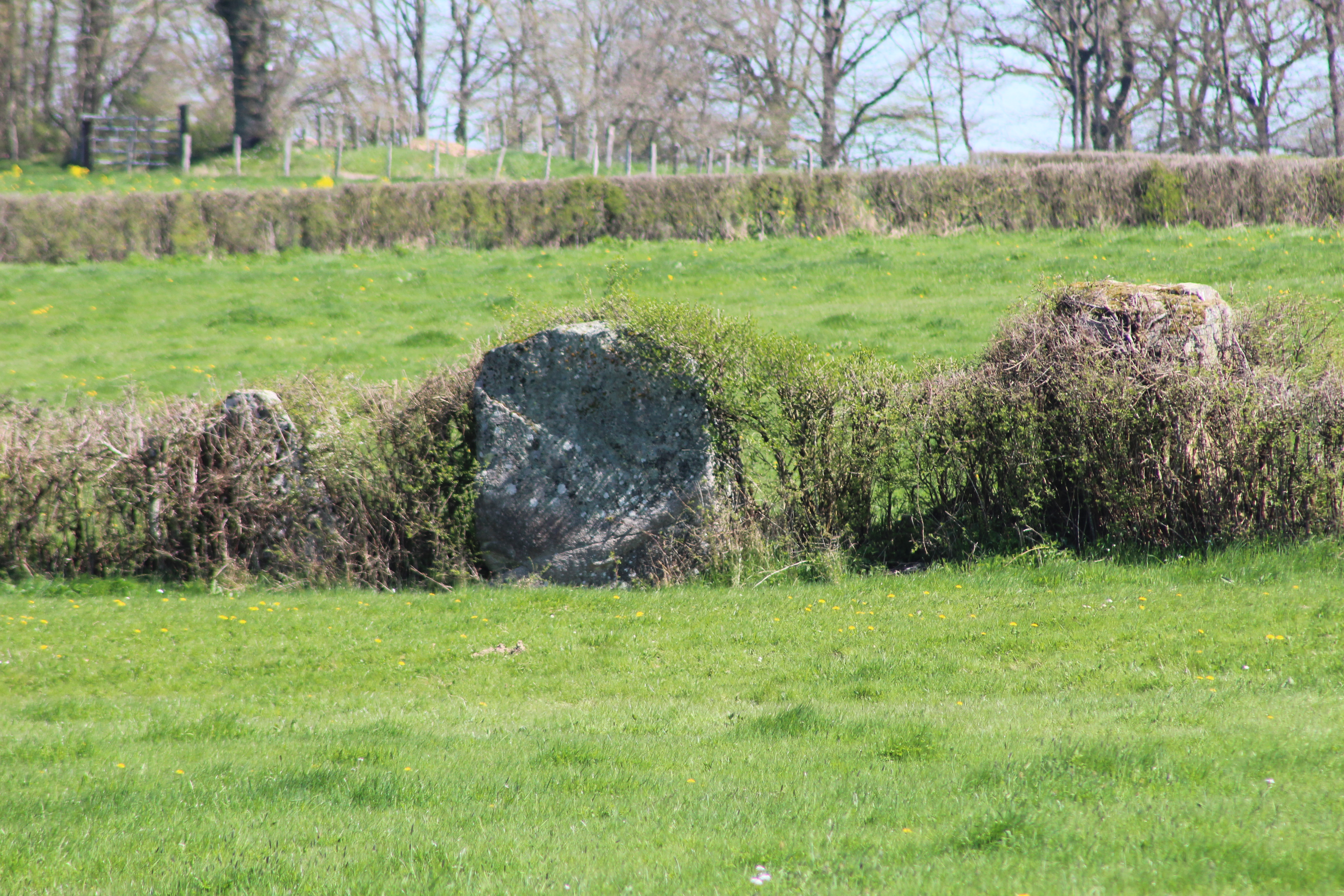 Alignements du Camp de la Justice, Autun.